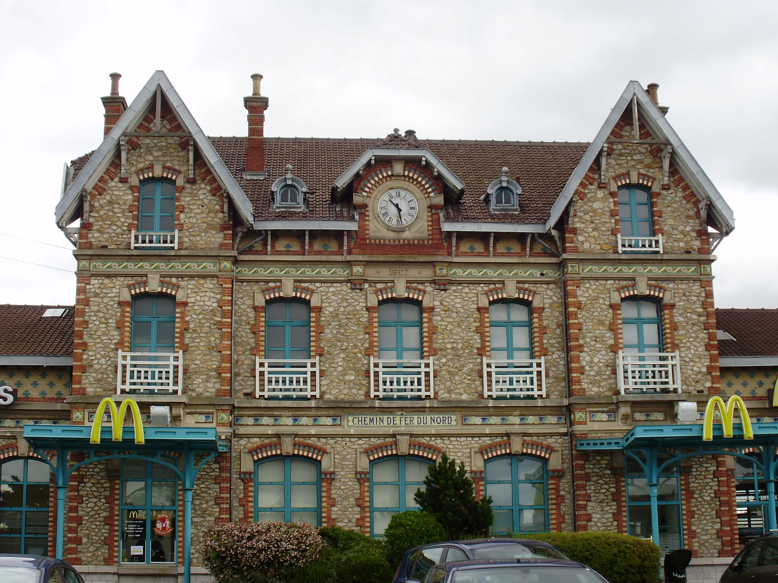 Ancienne gare de Gennevilliers, avenue Marcel-Paul (D 911), à Gennevilliers, Hauts-de-Seine, France : façade de l'ancienne gare, devenue un établissement de restauration rapide